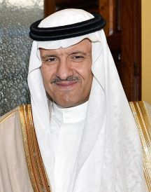 Prince Sultan bin Salman